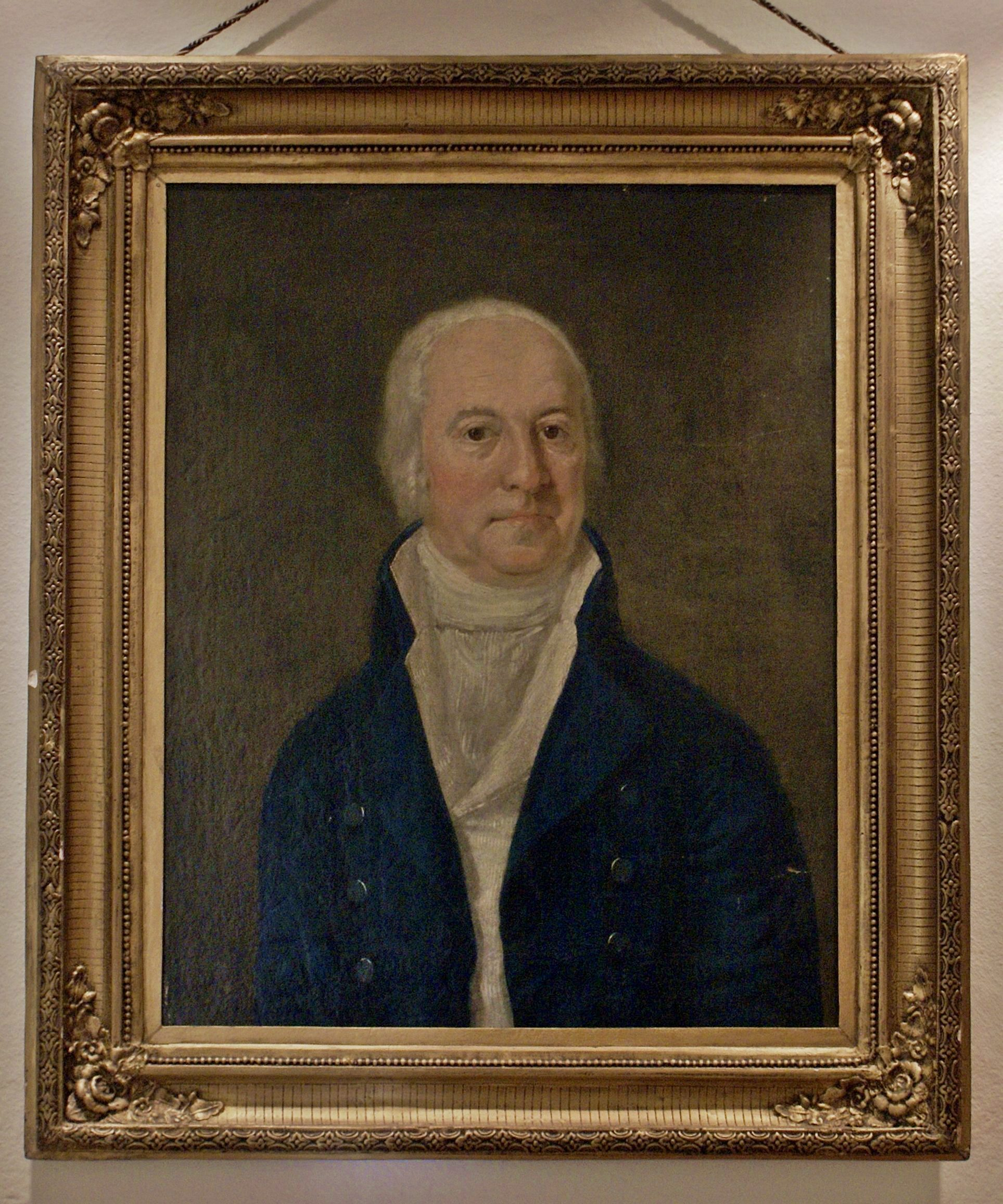 Portret Stanisława Staszica, znajdujący się w muzeum Stanisława Staszica w Pile. Autor obrazu nieznany. Powstanie obrazu datuje się na lata 20. XIX w.